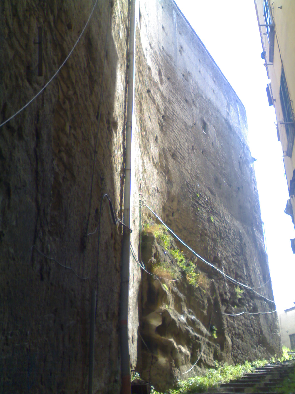 Mura del Complesso di Suor Orsola Benincasa (Napoli)